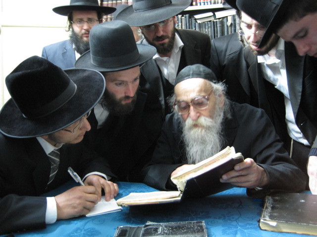 הרב משולם דוד הלוי סולובייצ'יק מלמד תלמידים